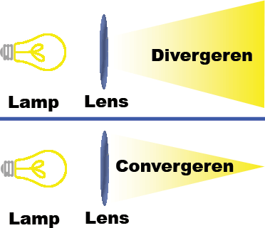 Eigen werk (zelf getekend)